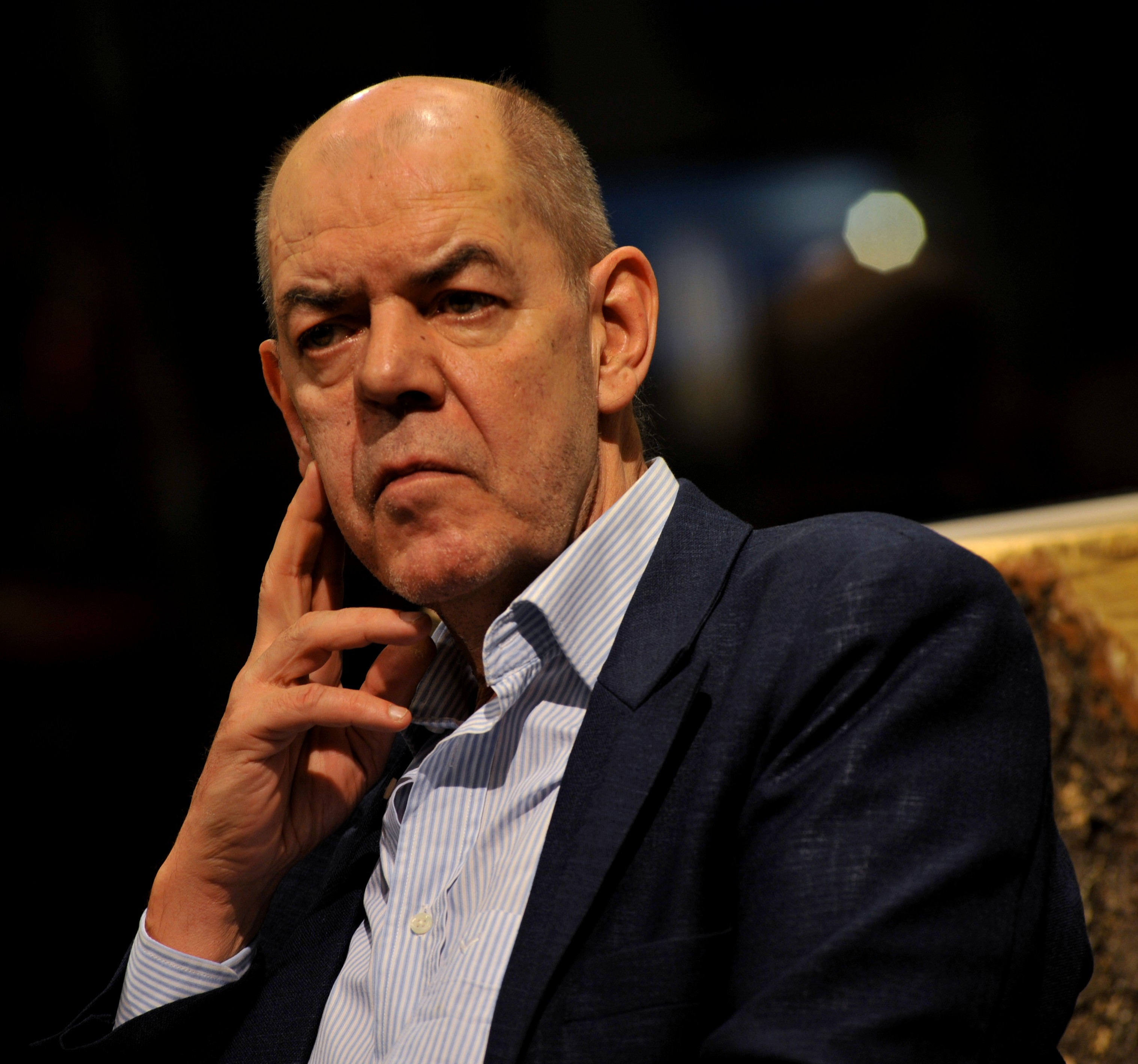 Leif Salmén, suomalainen toimittaja ja kirjailija, Helsinki, marraskuu 2012.